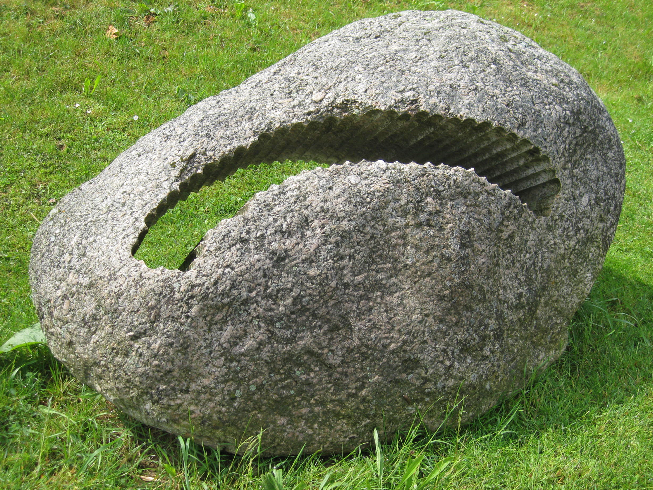 Hans Michael Franke, Both sides now rest, 1994, - Deutschland, Baden-Württemberg, Rottweil-Hausen, KUNSTdünger Skulpturenfeld